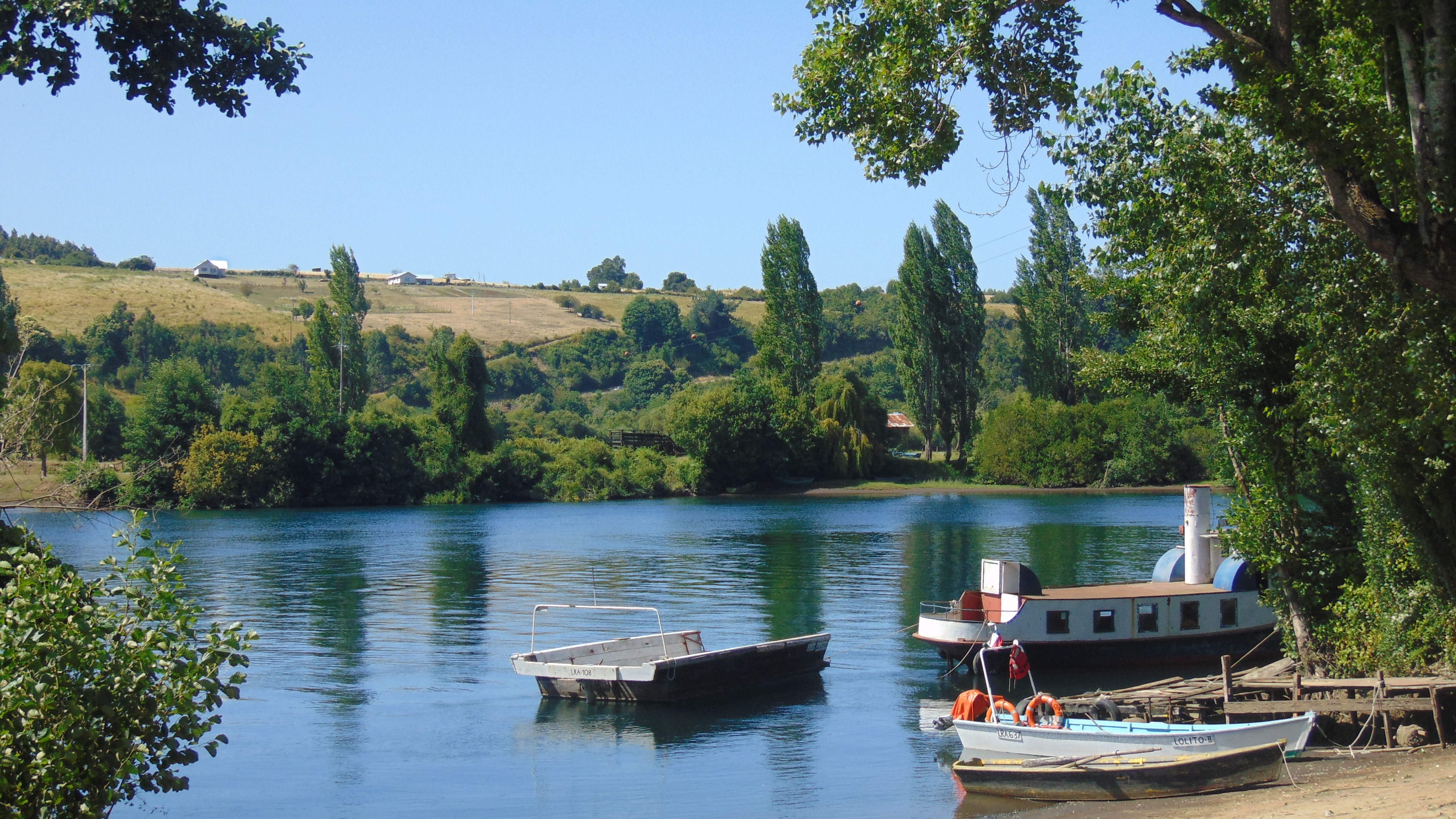 Vista de embarcadero Trumao, Chile